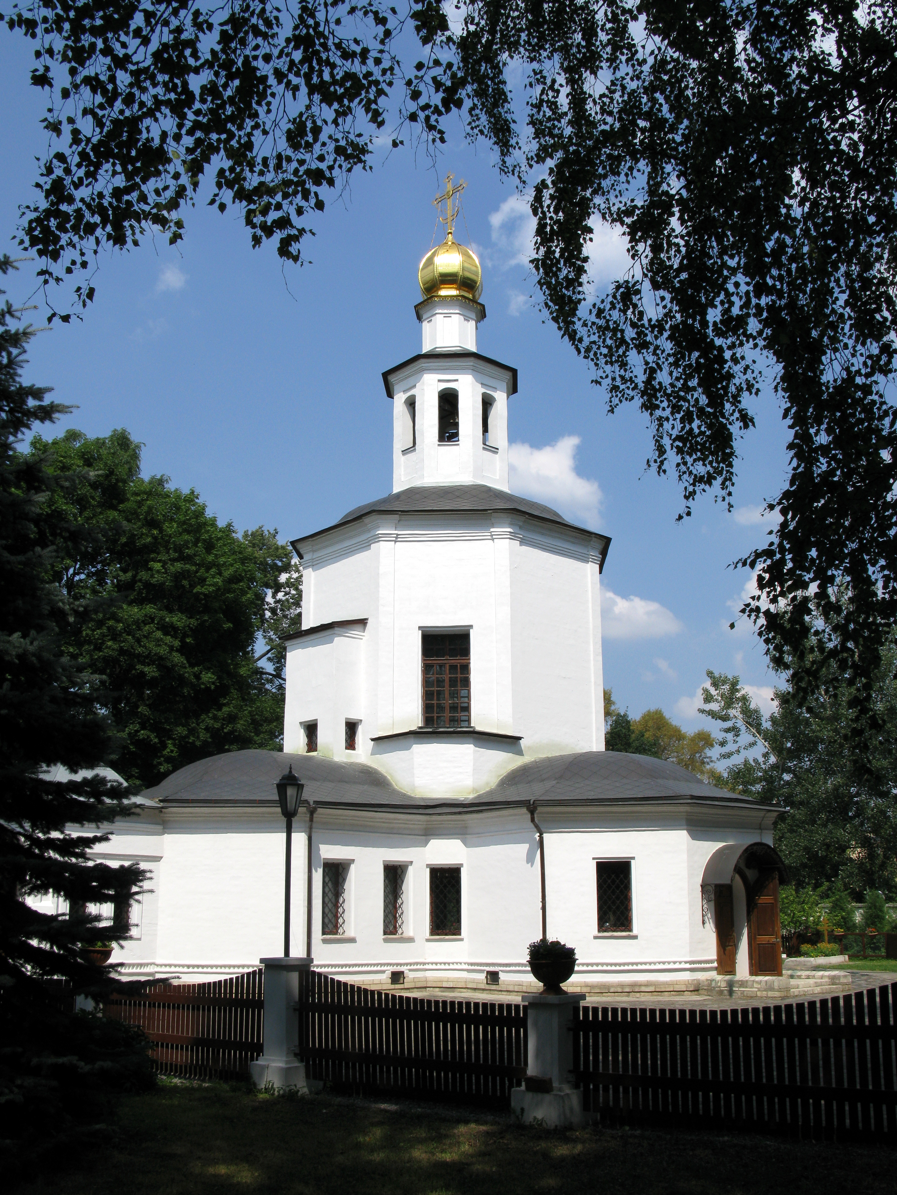 Храм Спаса Нерукотворного в Гирееве (г.Москва, Свободный проспект, 4а.)